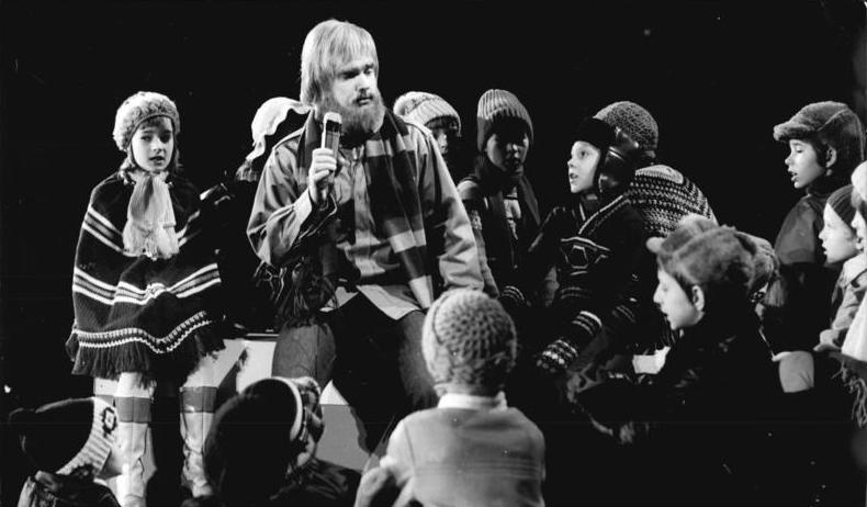 ADN-ZB Rehfeld-21.12.76 Berlin: "Bärchens wundersame Reise" ist der Titel einer weihnachtlichen Revue für Kinder im Großen Saal des Palastes der Republik, die am 21.12.76 ihre öffentliche Generalprobe erlebte. Das bunte Programm, zu dem Jochen Thomas das Buch schrieb und Regie führt, wird von großen und kleinen Künstlern gestaltet und soll an den drei Tagen vor Weihnachten fünf mal aufgeführt werden. Einer der prominentesten Weihnachtsmänner dieser Revue ist Frank Schöbel (Foto), der sich jedoch erst zum Schluß der Veranstaltung als der bekannte Schlagerstar zu erkennen gibt."